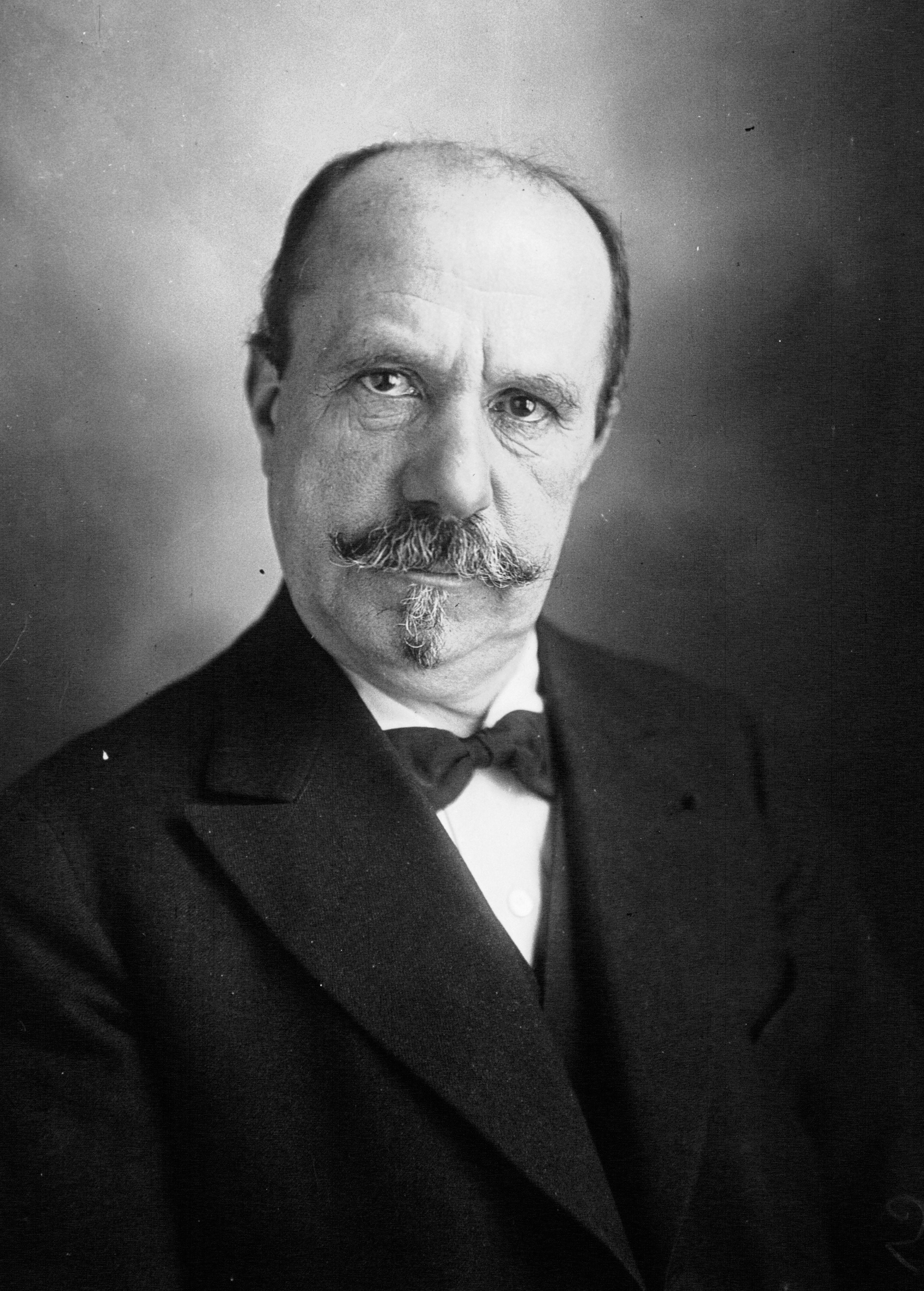 Peirotes, député et maire de Strasbourg (Bas-Rhin) : photographie de presse